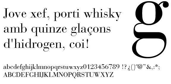 Pangram català Bauer Bodoni